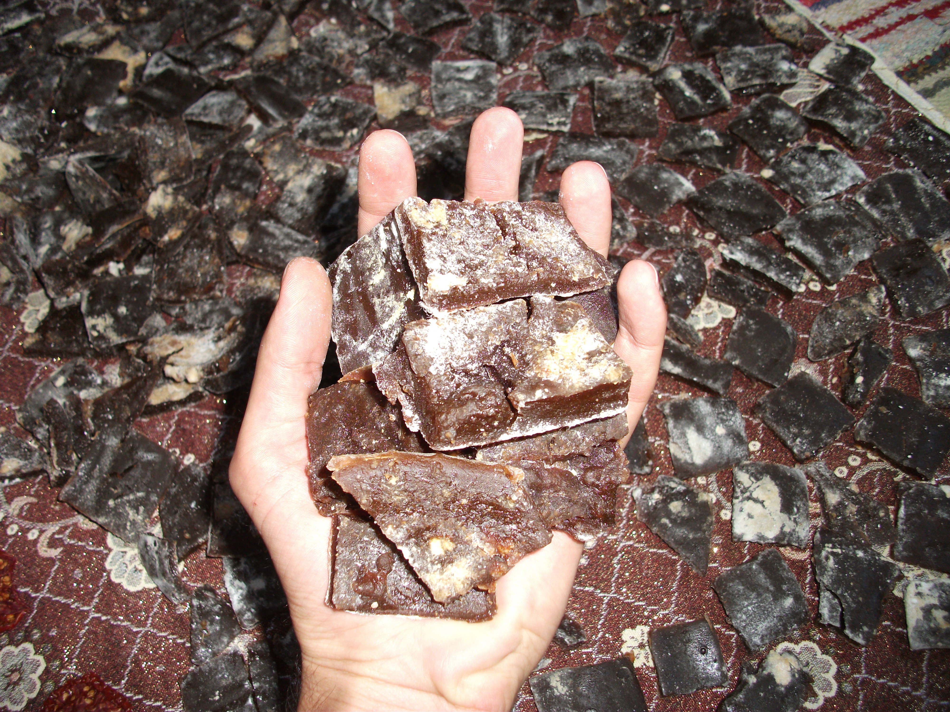 Toraman Köfteri